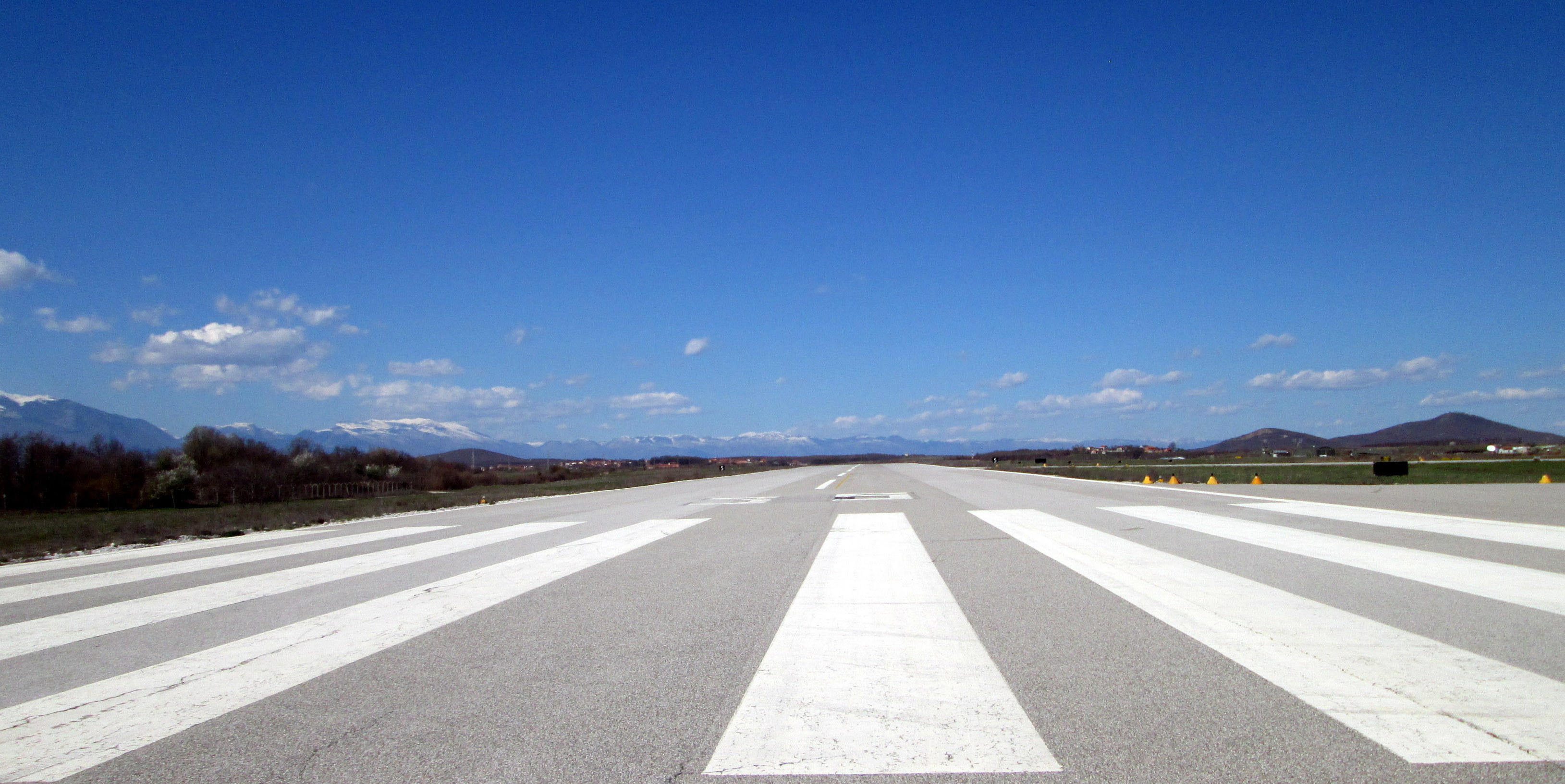 Aeroporti i Gjakovës